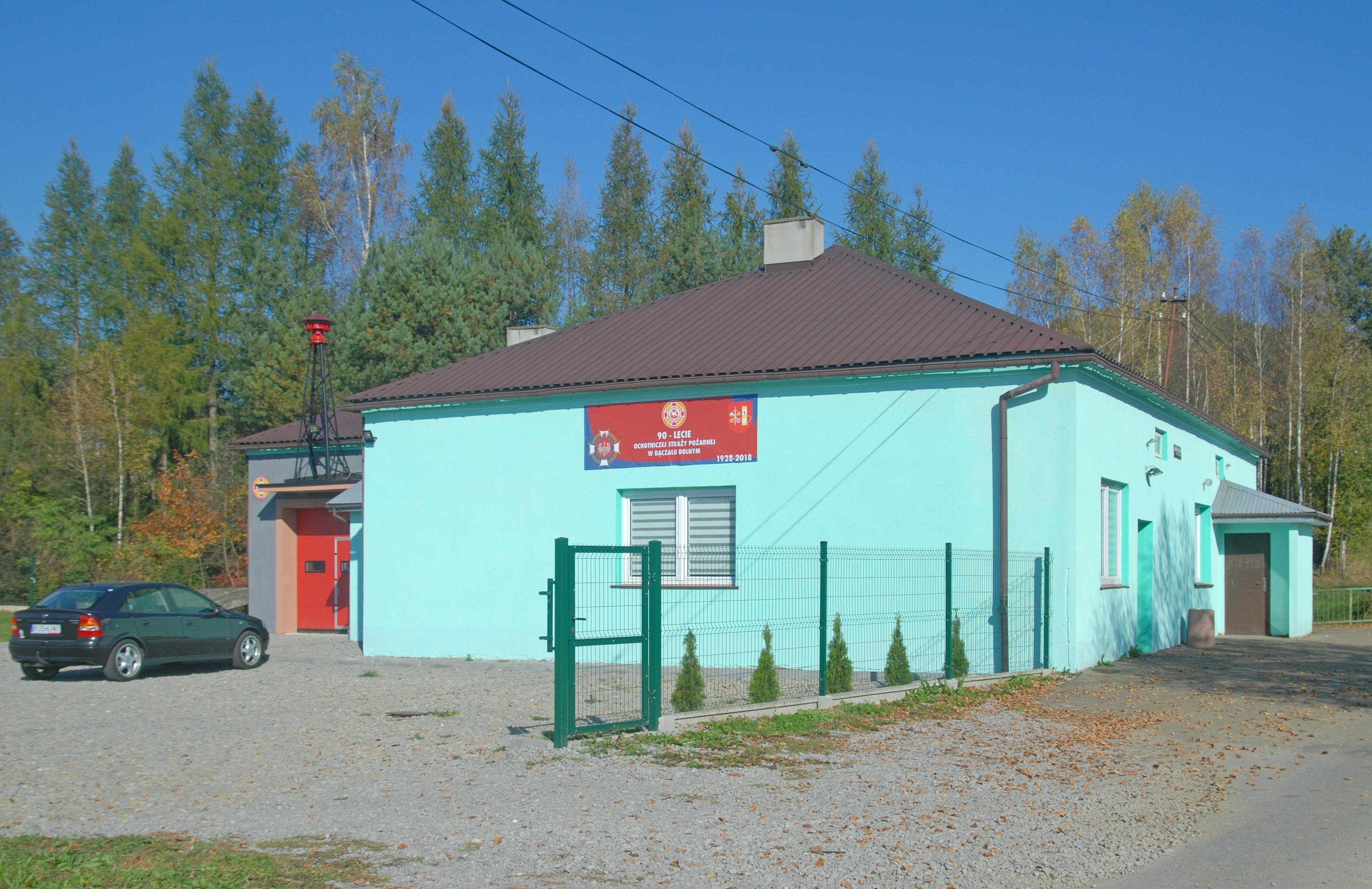 wieś Bączal Dolny